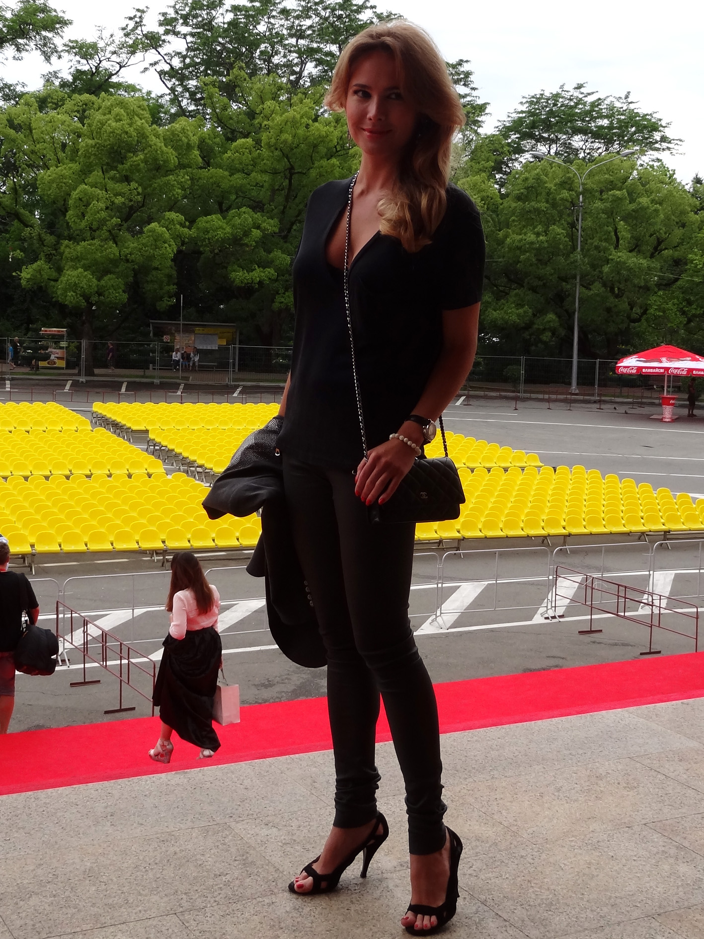 Анна Андреевна Горшко́ва — российская актриса и фотомодель. Церемония открытия фестиваля "Кинотавр -2014" в Сочи.